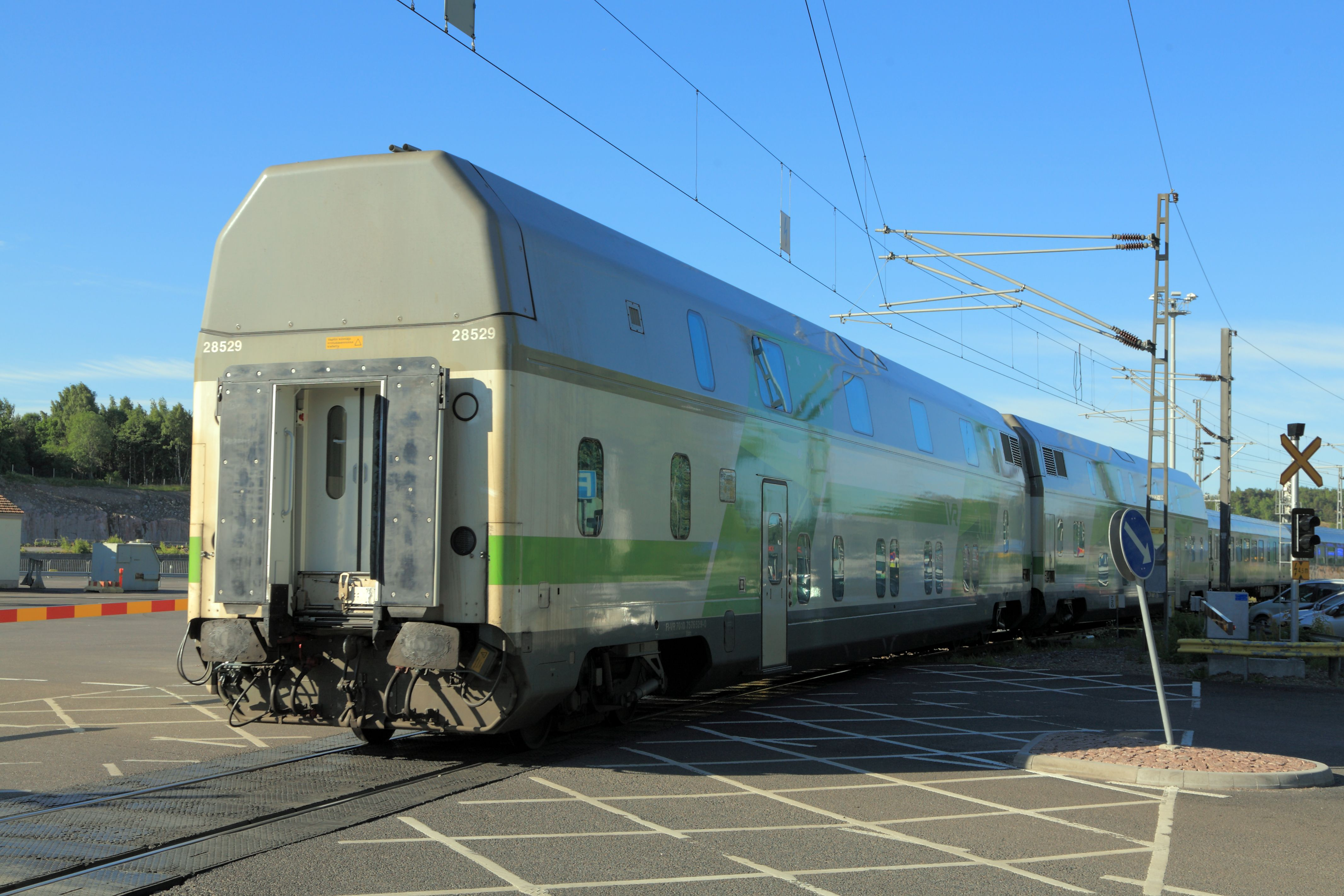 Einfahrender Nachtzug von Rovaniemi im Bahnhof Turku Hafen. Am Schluss laufen zwei Doppelstockschlafwagen der Gattung Edm. Äußerlich sichtbare Unterschiede zu den Sitzwagen sind die abweichende Fensterteilung und das Vorhandensein von nur einem Einstieg pro Wagen. Wegen der gleichmäßigen Masseverteilung liegen die Seitengänge im Ober- und Unterstock, an der Fensteteilung erkennbar, auf der jeweils anderen Wagenseite.